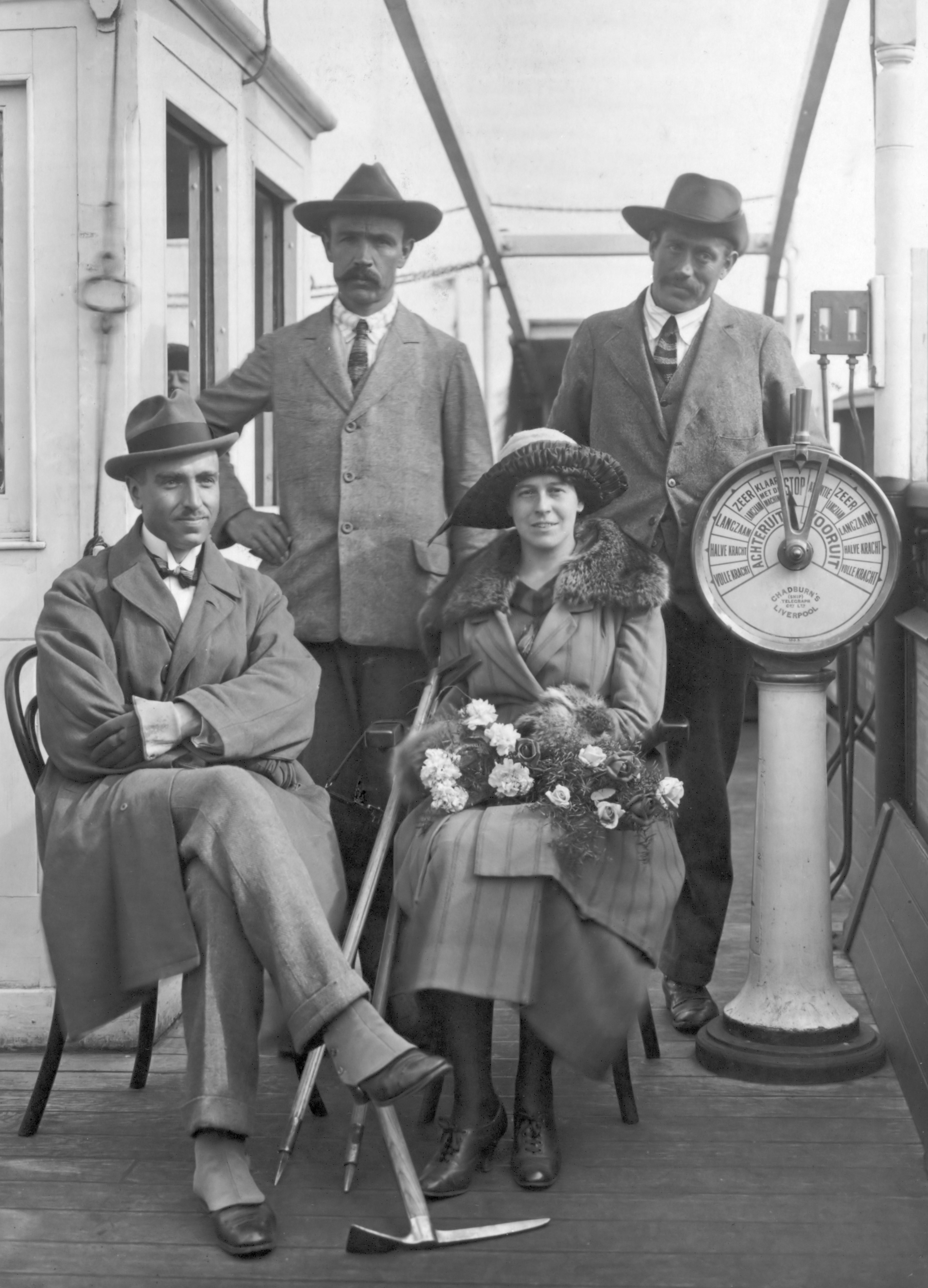 Het echtpaar Visser - Hooft met de gids Franz Lochmatter (r) en Johann Brantschen (l) bij hun terugkeer in Nederland na de eerste Karakorum expeditie 1923/01/01